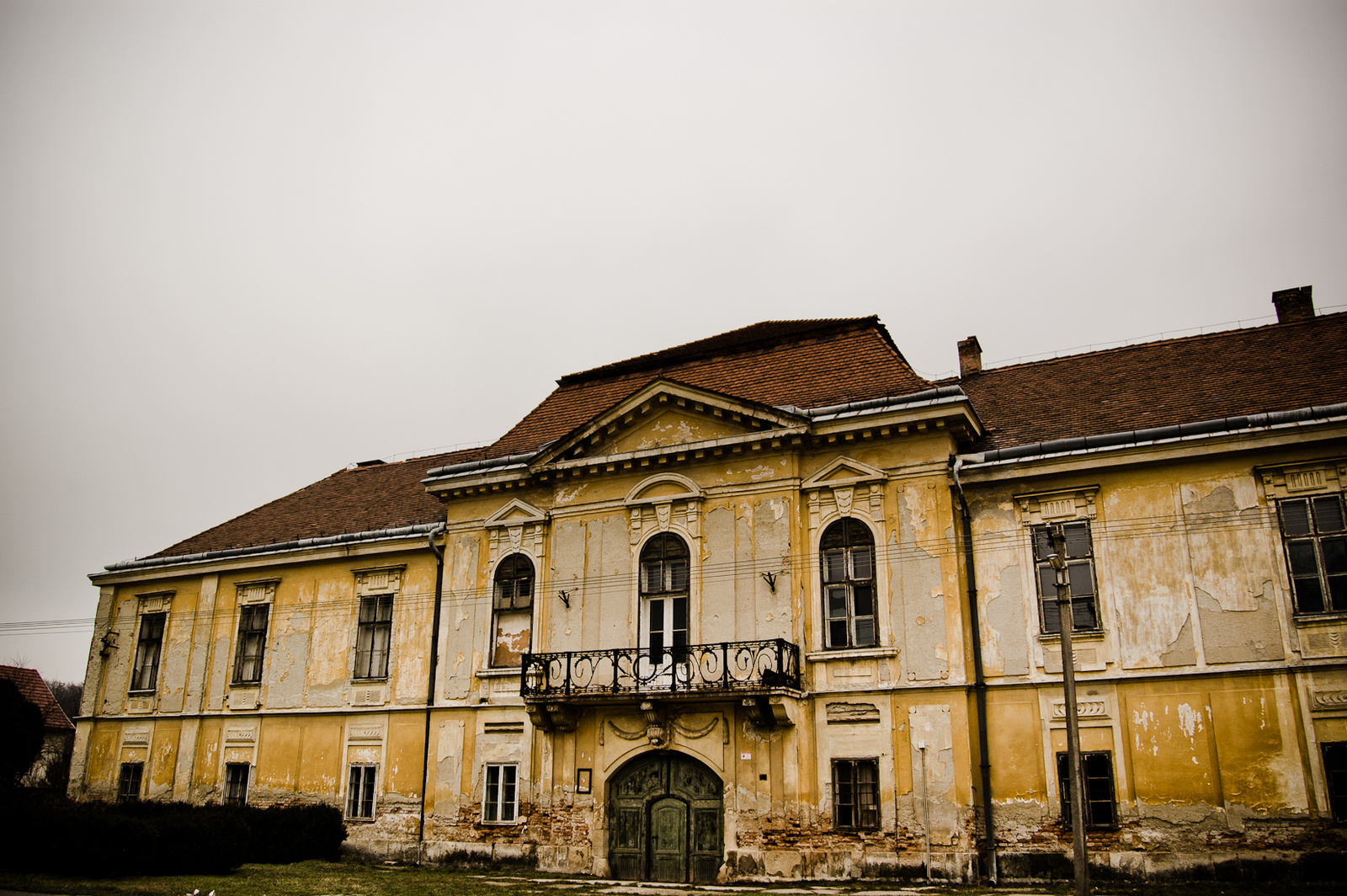 Ürményi-kastély (Vál, Magtár utca 2.)